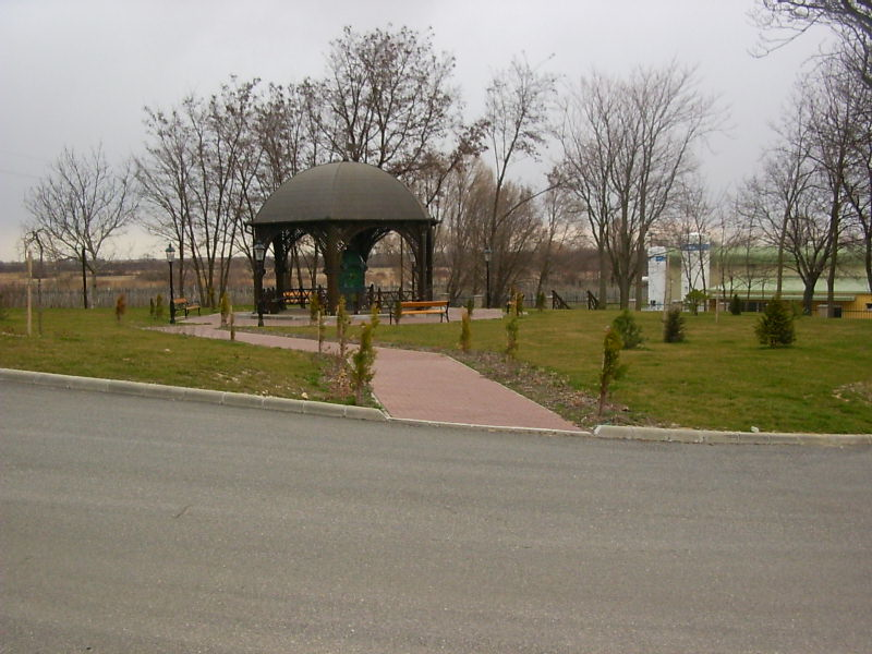 A balfi gyógyvíz nyilvános ivókútja. A kép hátterében a balfi gyógyvíz palackozó üzeme látszik (Sopron)